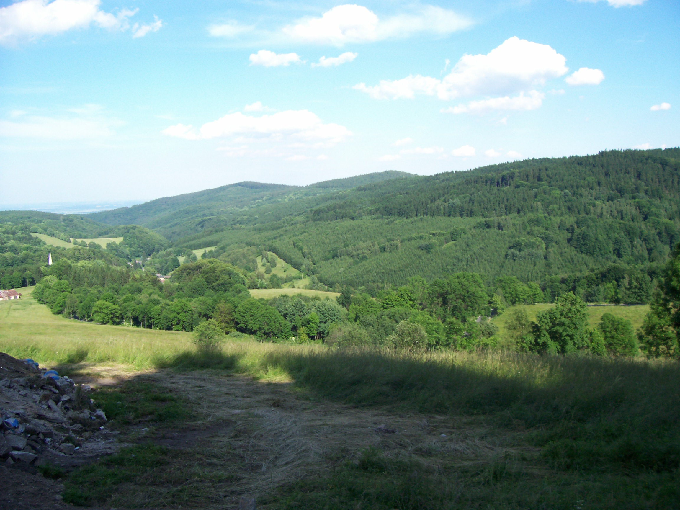 Widok z Przełęczy Lądeckiej na stronę czeską. W dole wieś Travna.